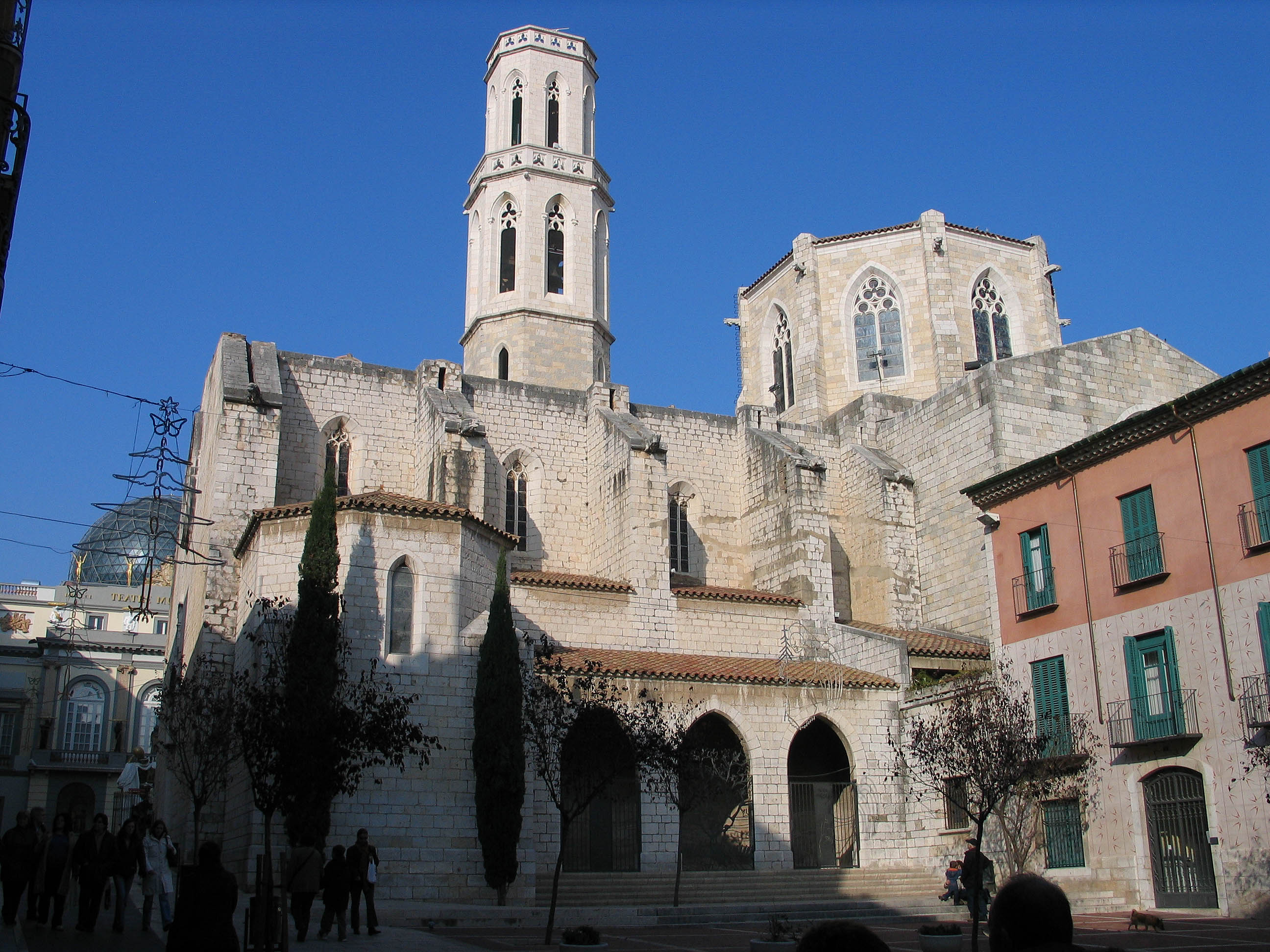 Église San Pere, à Figuères (province de Gérone, Catalogne, Espagne).